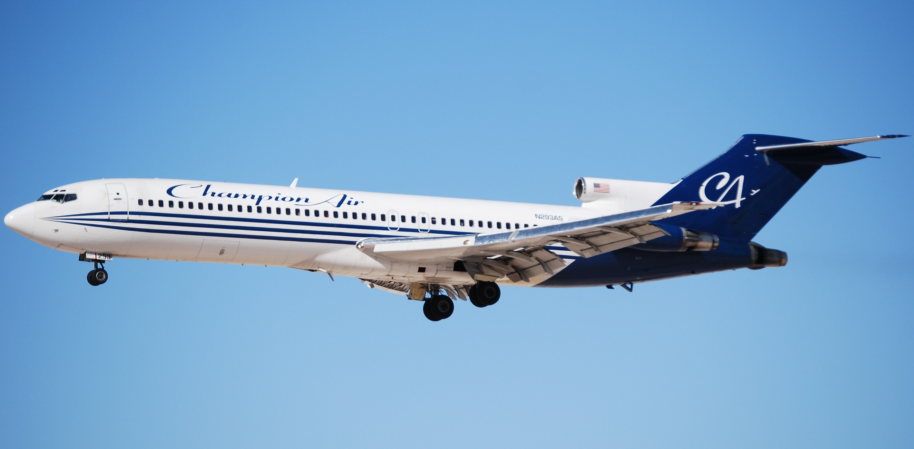 CHAMPION 727